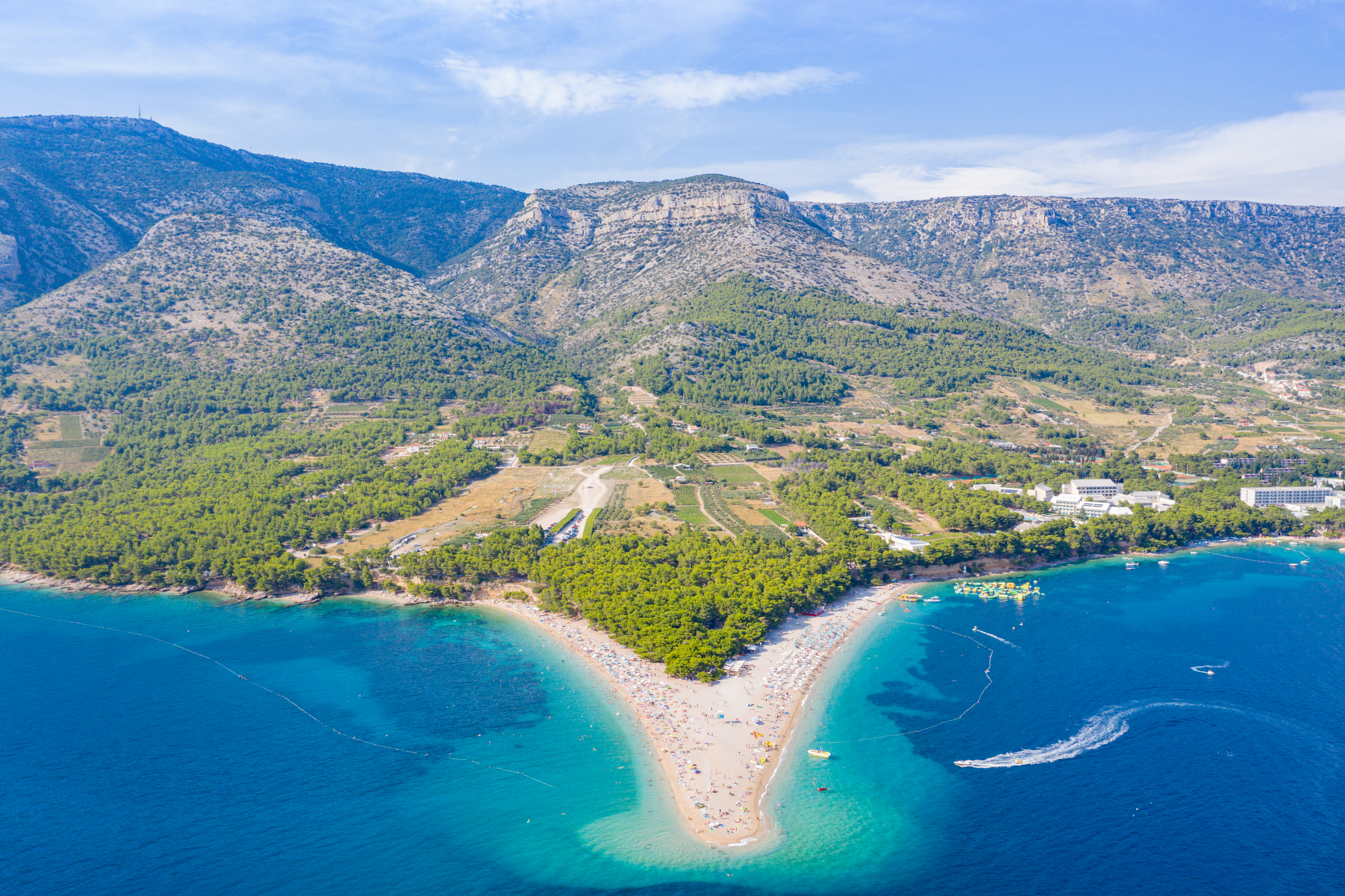 Croatia